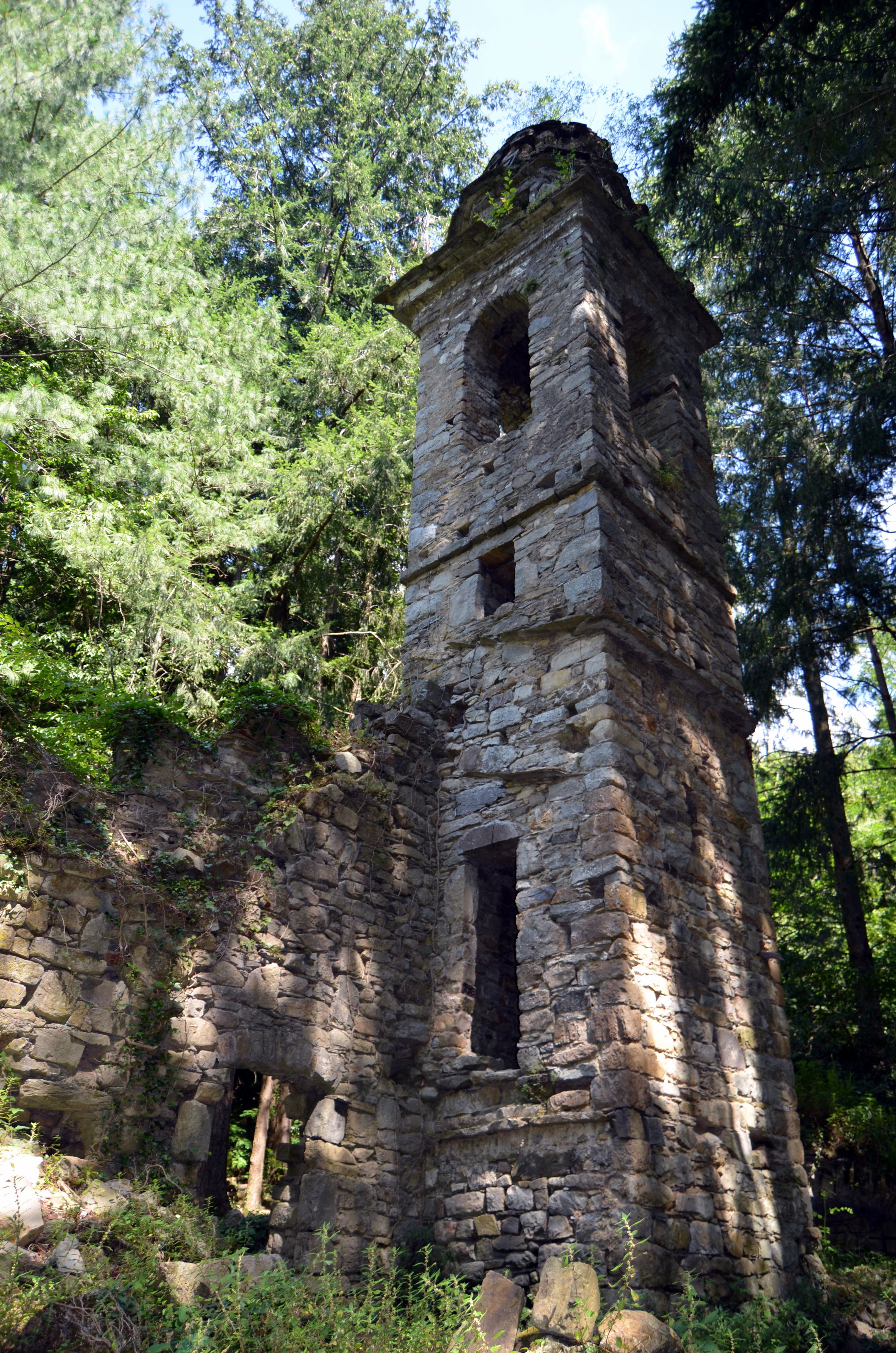 I ruderi della chiesa di San Martino di Licciorno, Prato Sopralacroce, Borzonasca, Liguria, Italia